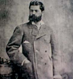 Cuban painter Guillermo Collazo Tejada (1850-1896)